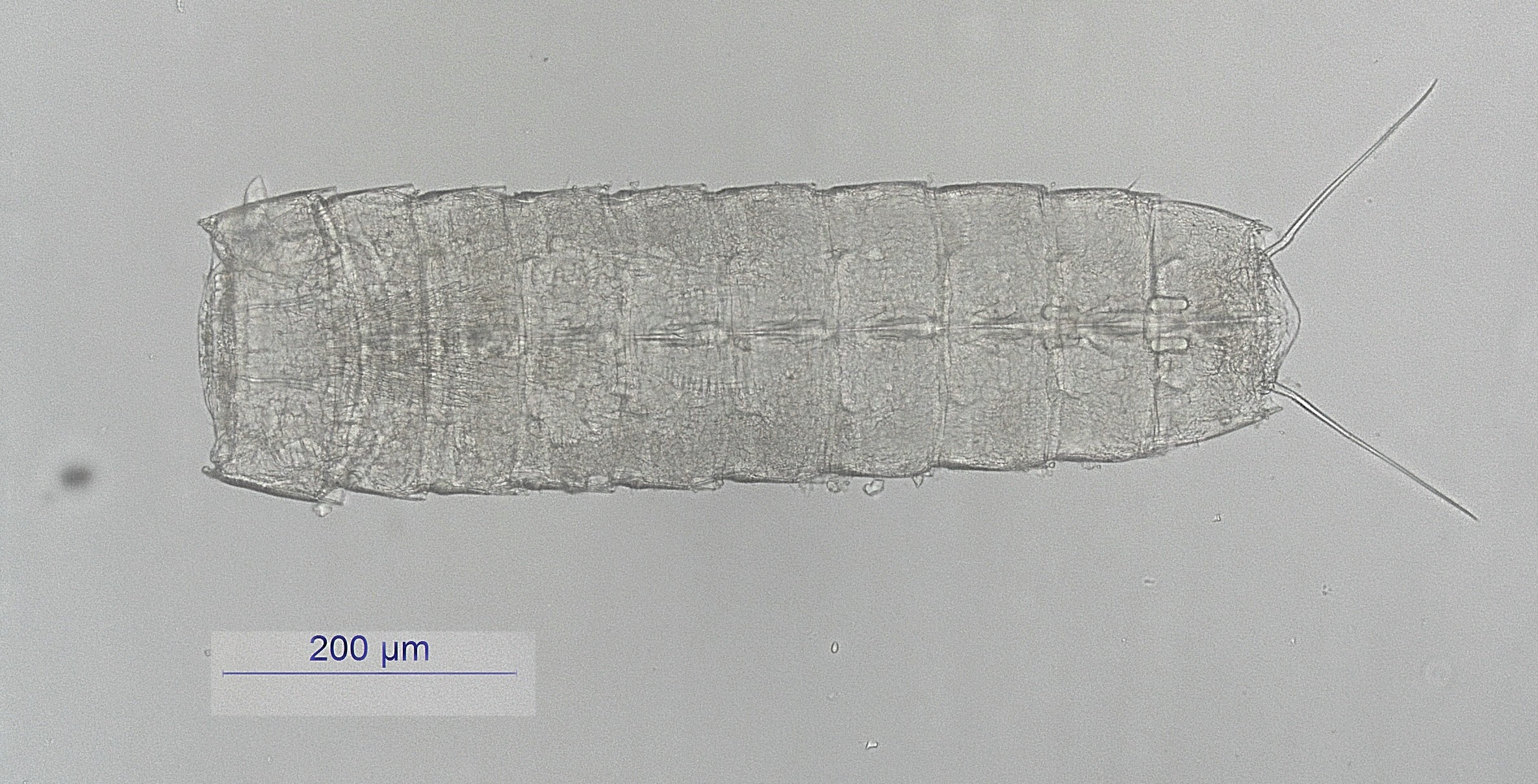 Pycnophyes dentatus